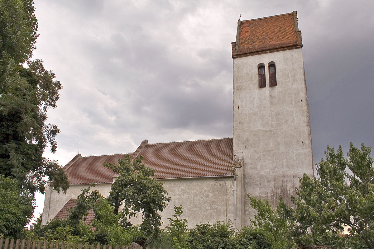 Wichow - kosciol z XIII w.